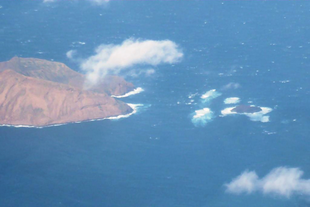 Roque del Oeste, kleine Kanareninsel im Chinijo-Archipel vor Lanzarote (links davon die Insel Montana Clara)